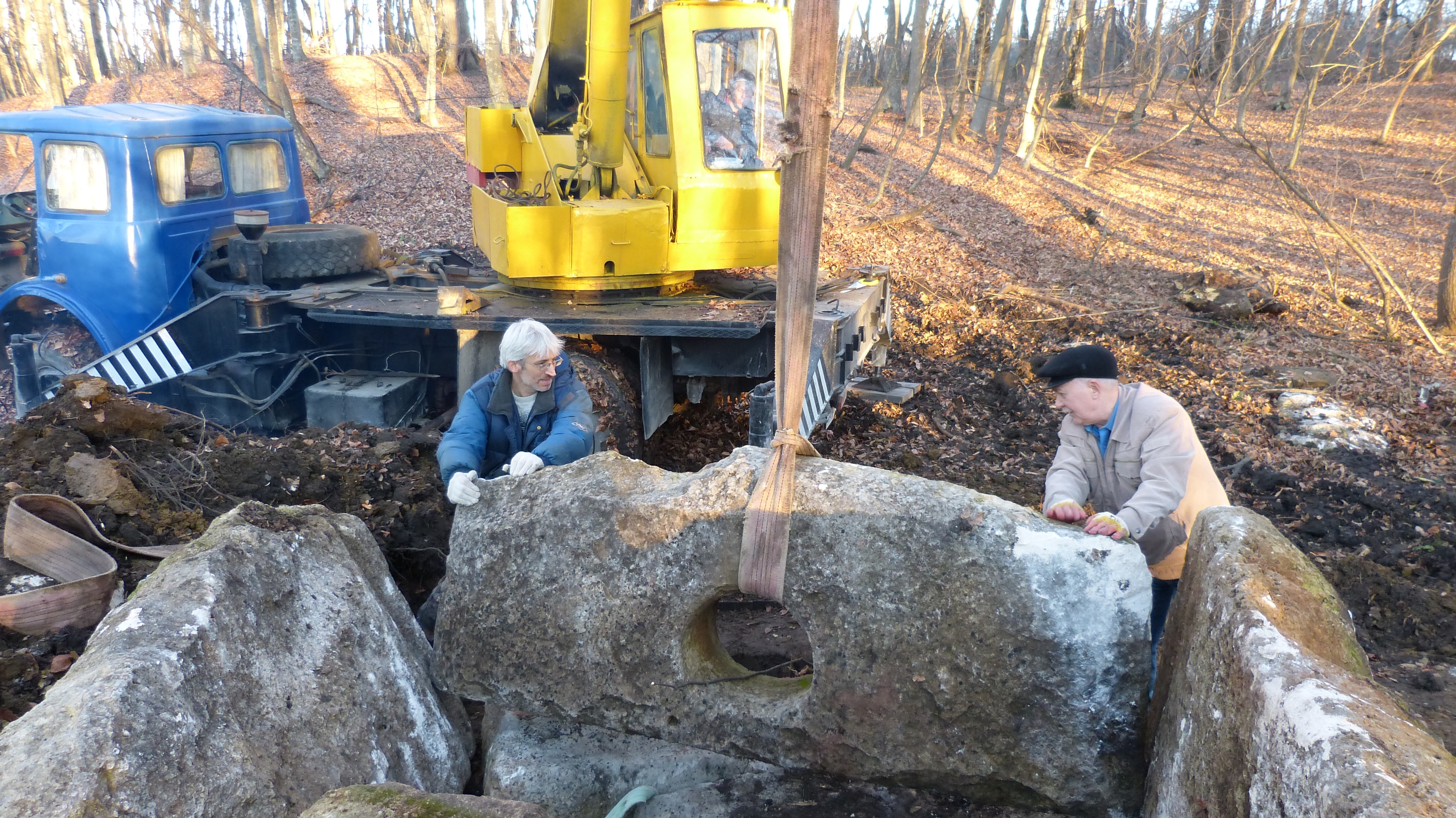 Археолог Резепкин (ИИМК РАН). Реконструкция дольменов. Ноябрь-декабрь 2016 года.